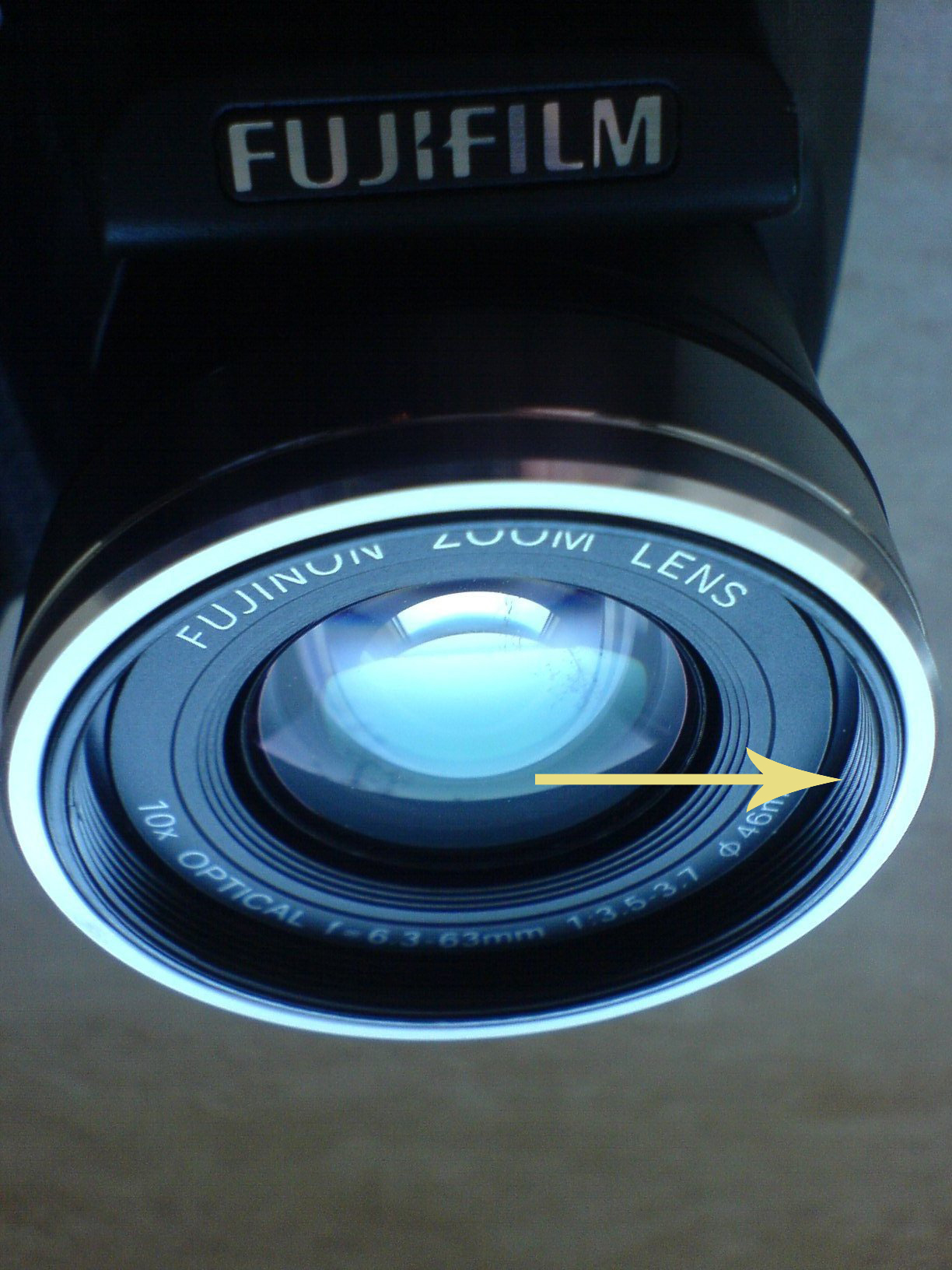 Fujifilm FinePix S5700 Digitalkamera: Gewindegang für Filteraufsätze (Innengewinde am Objektiv, Durchmesser 46mm, Windungen und Steigung derzeit unbekannt)